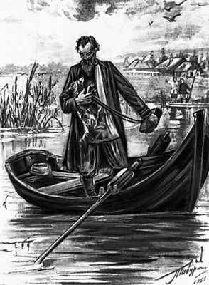 «Mu-Mu», engraving by Vladimir Taburin